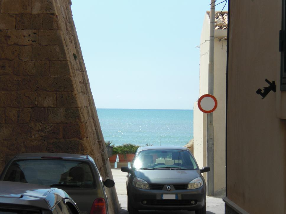 Bastione della Torre Cabrera (Marina di Ragusa) Marzo 2009